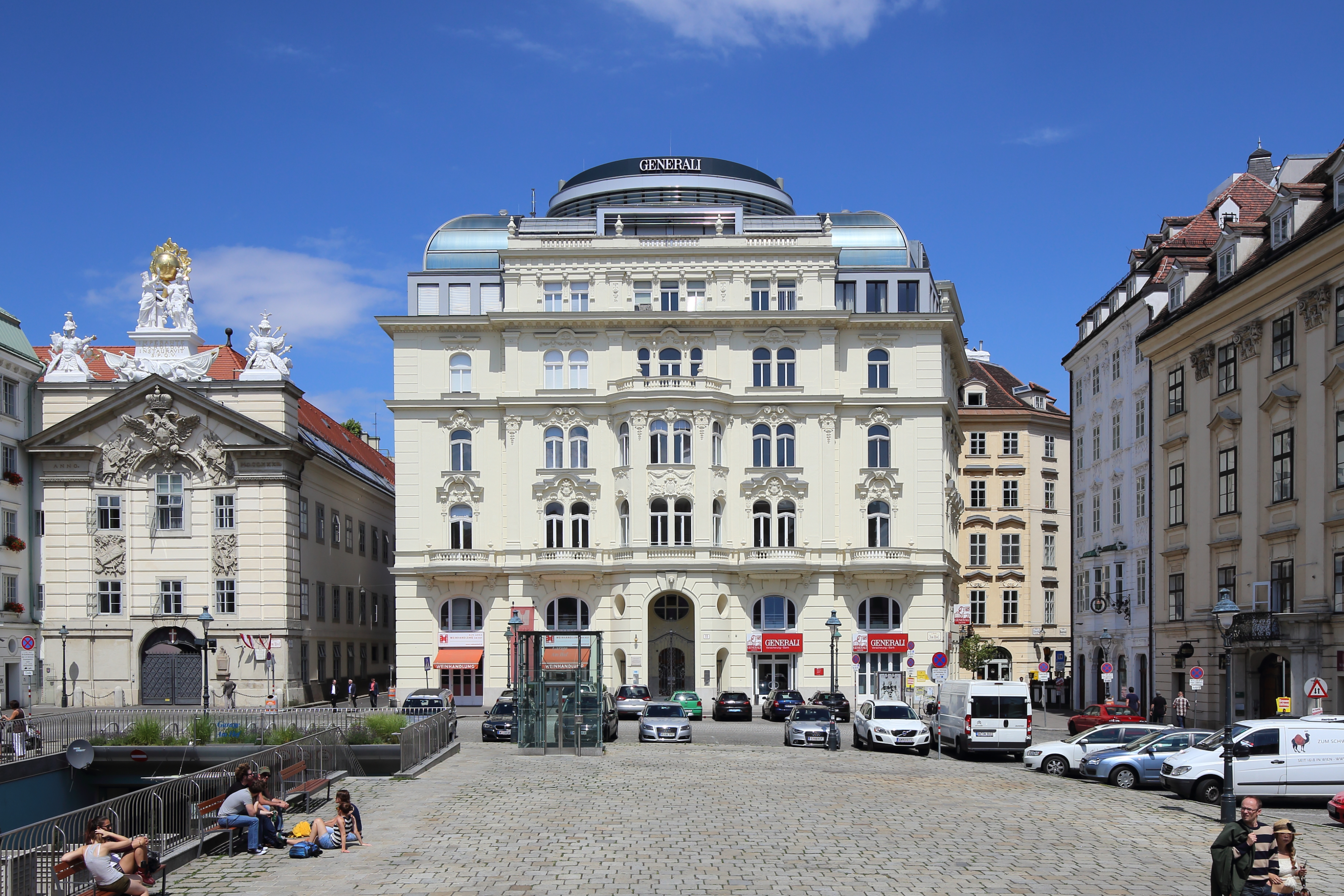 Hauptfassade des Miet- bzw. Wohnhauses Am Hof 11 und links das denkmalgeschützte ehemalige bürgerliche Zeughaus und heutige Feuerwehrzentrale im 1. Wiener Gemeindebezirk Innere Stadt. Das Haus wurde von 1882 bis 1883 vom Architekten und Baurat Ludwig Tischler für Herrn Bernhard Hoffmann errichtet. Im Jahr 1933 wurde die Fassade von Otto Schönthal und Emil Hoppe umgestaltet. Um 2010 erfolgte ein Dachausbau in Anlehnung an die in den Kriegswirren verloren gegangenen historischen Proportionen.